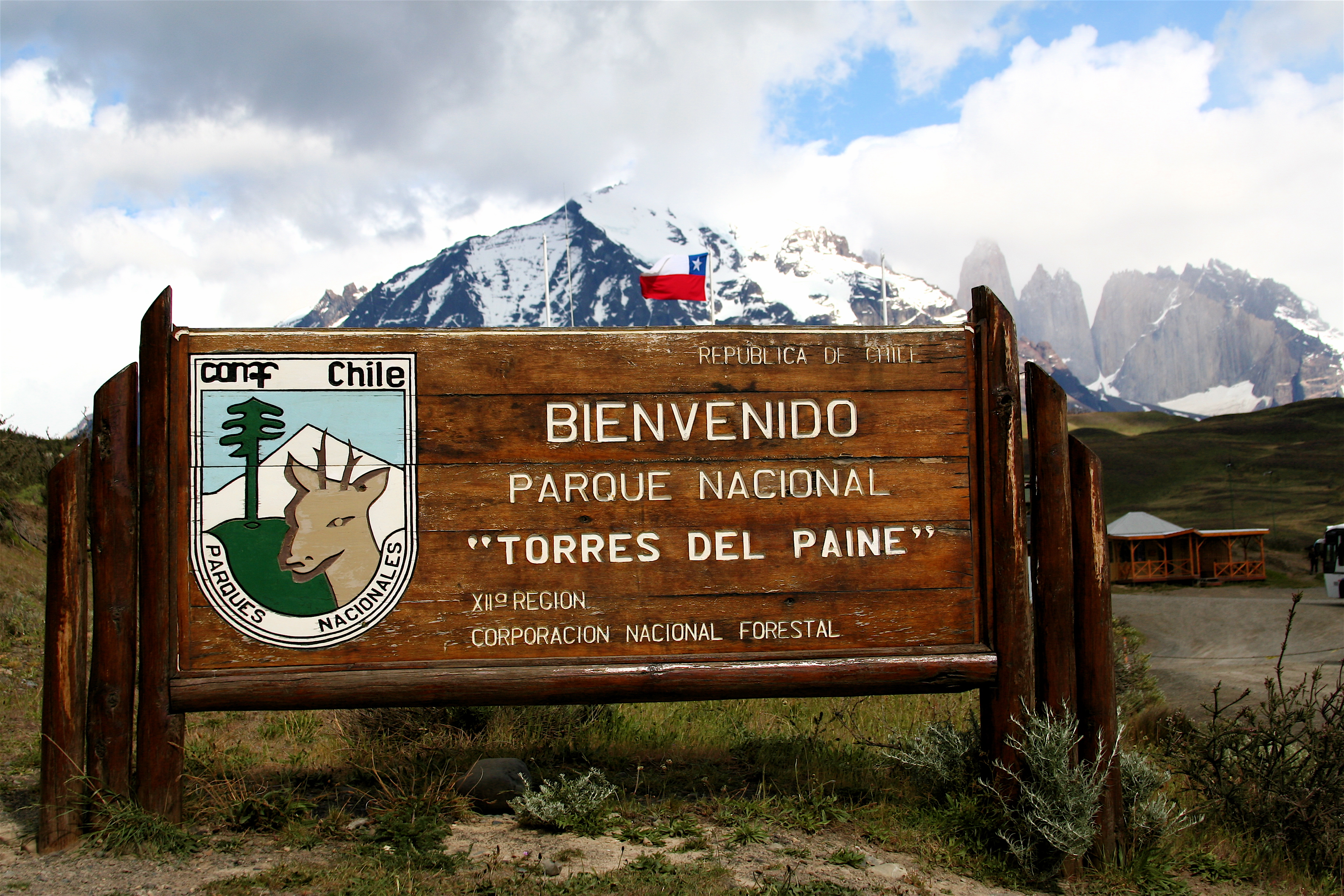 El Parque Nacional Torres del Paine es uno de los componentes del Sistema Nacional de Áreas Silvestres Protegidas del Estado de Chile. En 2006, ocupaba una superficie de 242.242 ha aproximadamente.